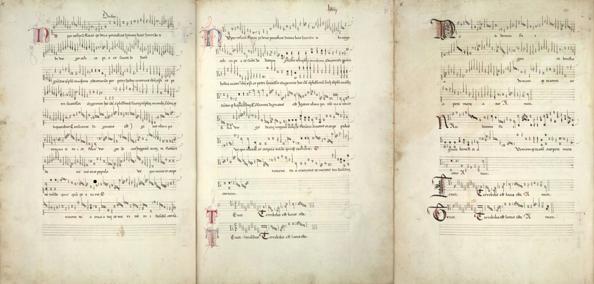 Guillaume Dufay: Die vierstimmige Domweihmotette Nuper rosarum flores